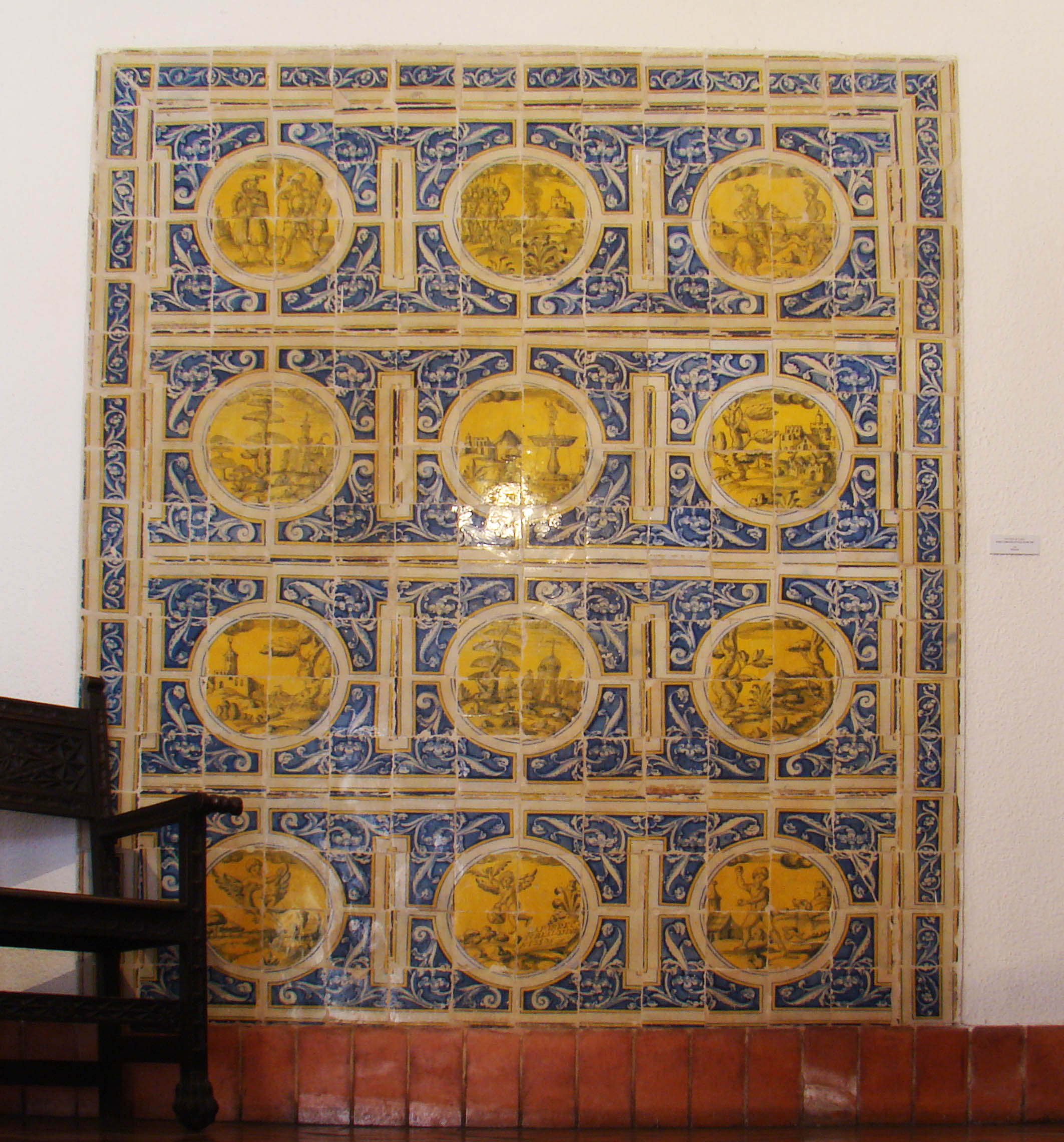 Obra de azulejería de Hernando de Loaysa realizada en el siglo XVI para decoración del palacio del banquero Fabio Nelli de Valladolid (España).